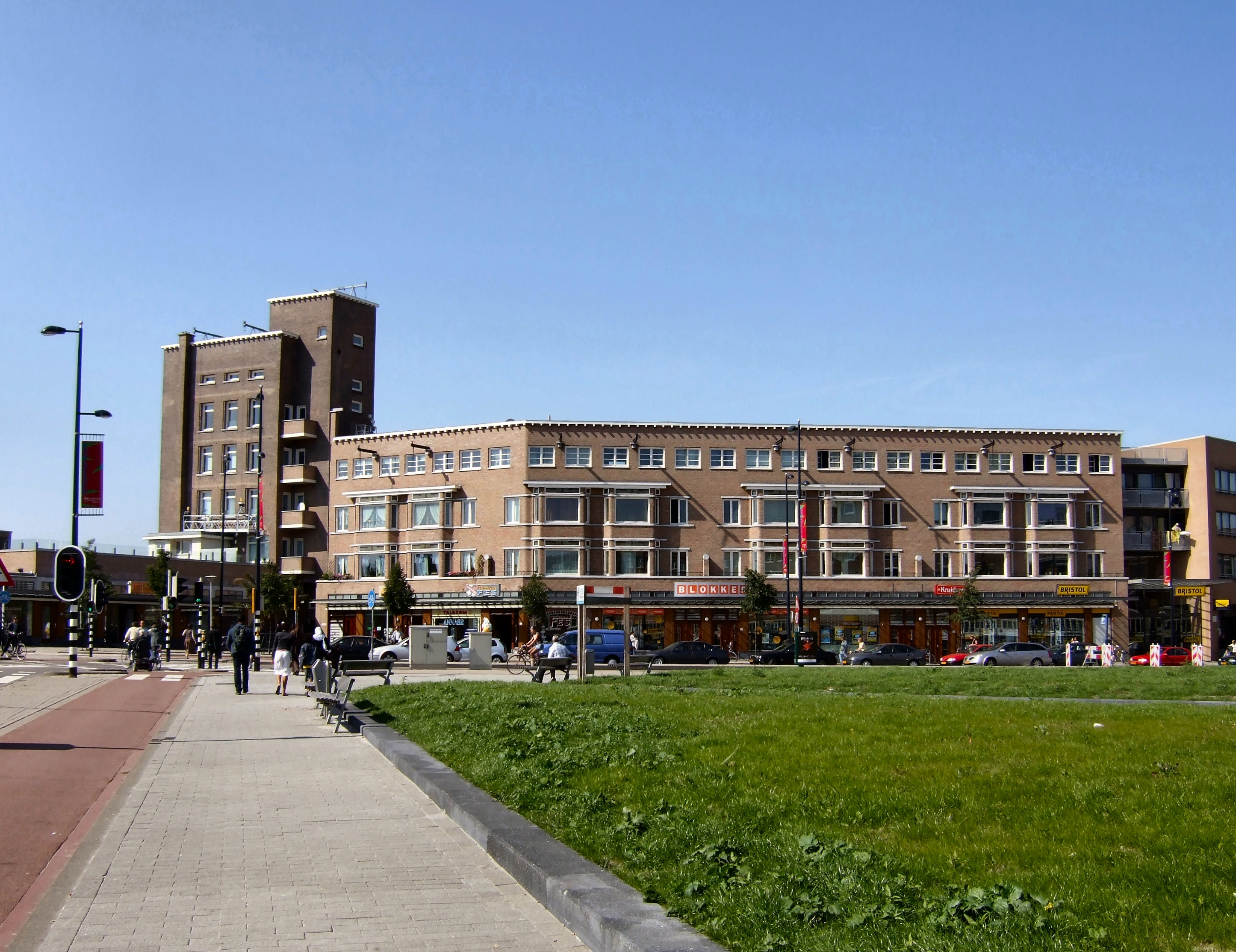 Mathenesserplein Noordzijde, 10 september 2006 Categorie:Afbeelding straat in Rotterdam